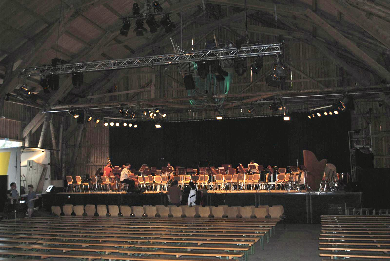 Musikscheune für die Stelzenfestspiele bei Reuth in Stelzen bei Reuth.